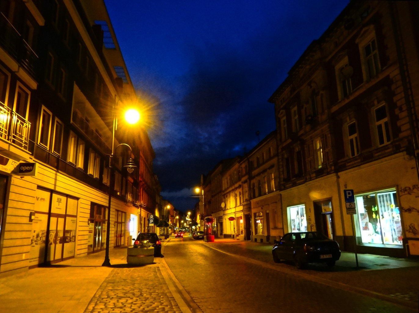 Ulica Dworcowa w Bydgoszczy